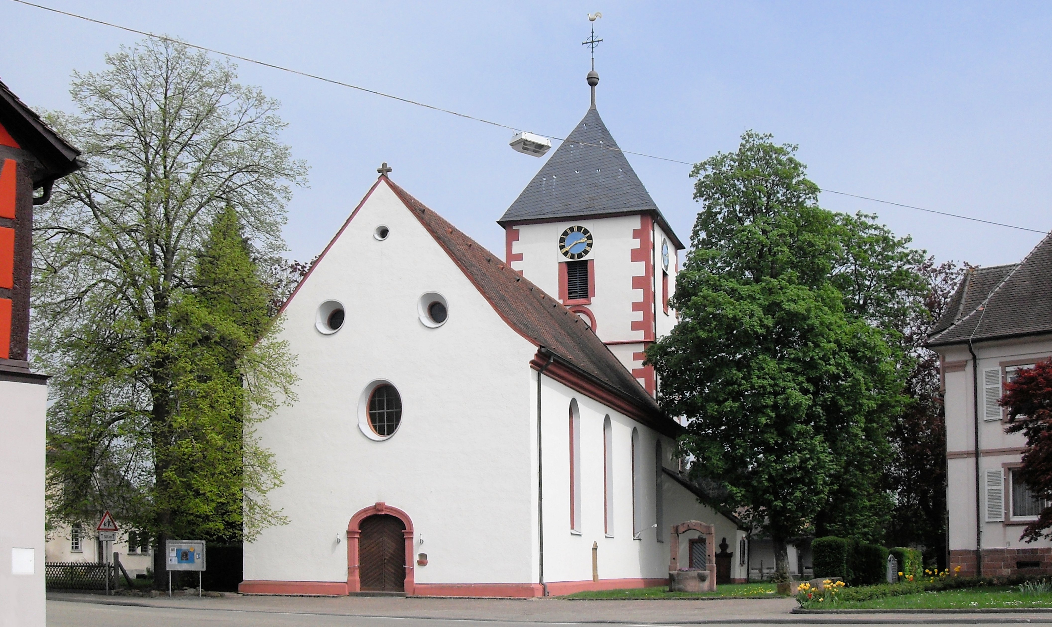 evangelische Kirche in Ottenheim, Gemeinde Schwanau, Ortenaukreis